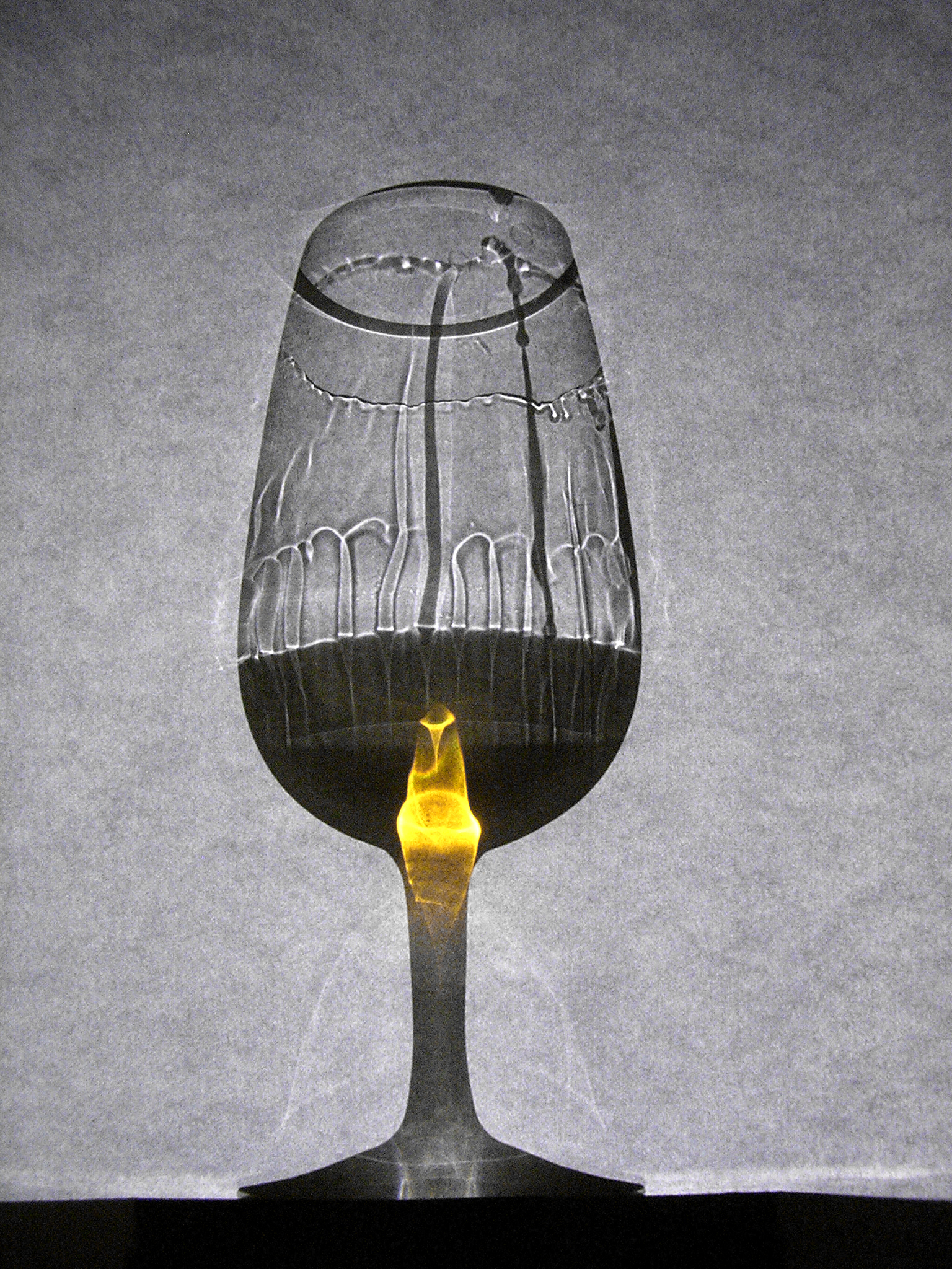 Verre de vin